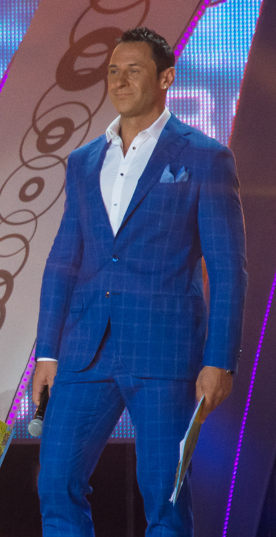 Ведущие Детской Новой волны 2016